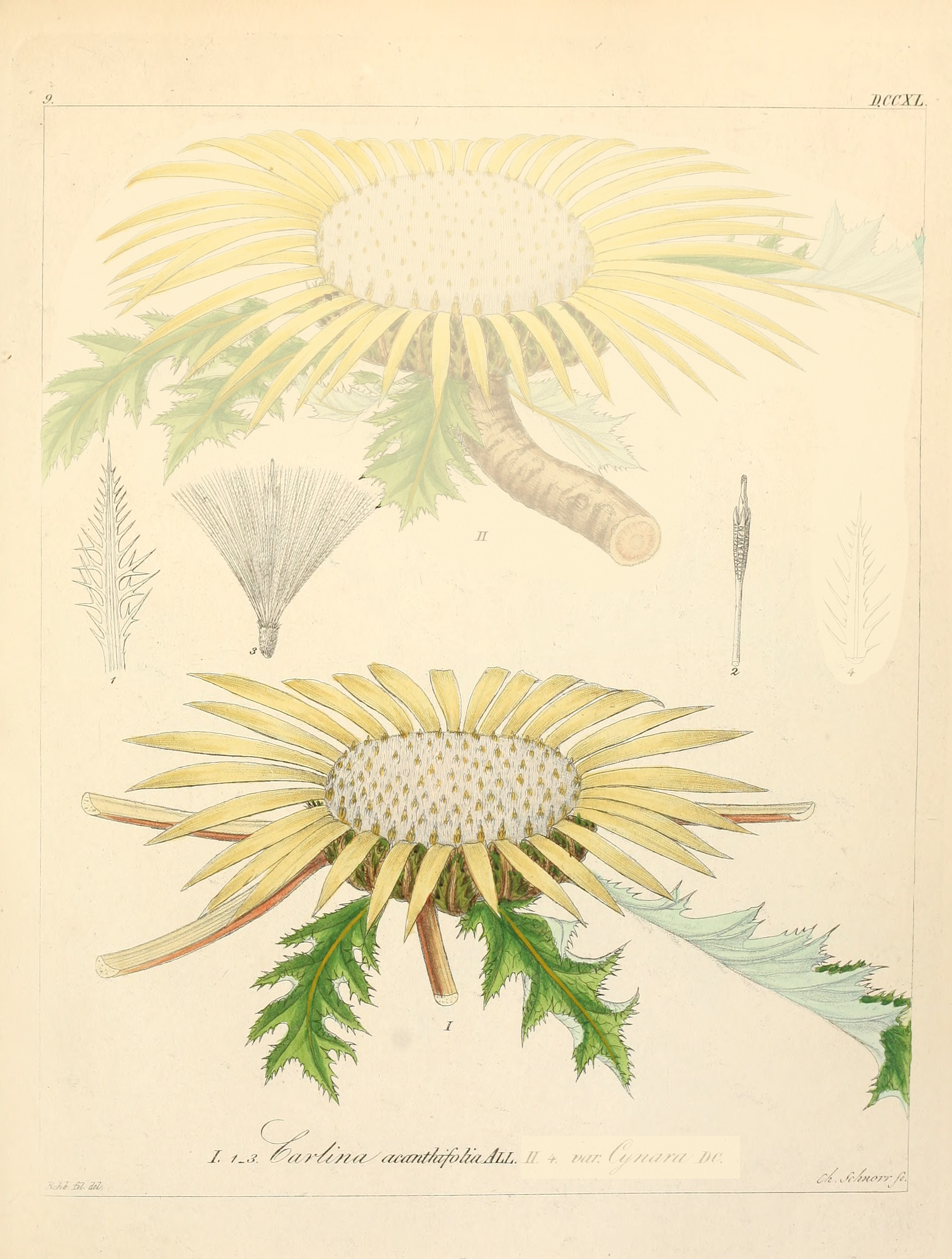 Legende: I Ganze Pflanze. 1 Äußeres Hüllblatt. 2 Röhrenblüte, Fruchtknoten entfernt. 3 Röhrenblüte.